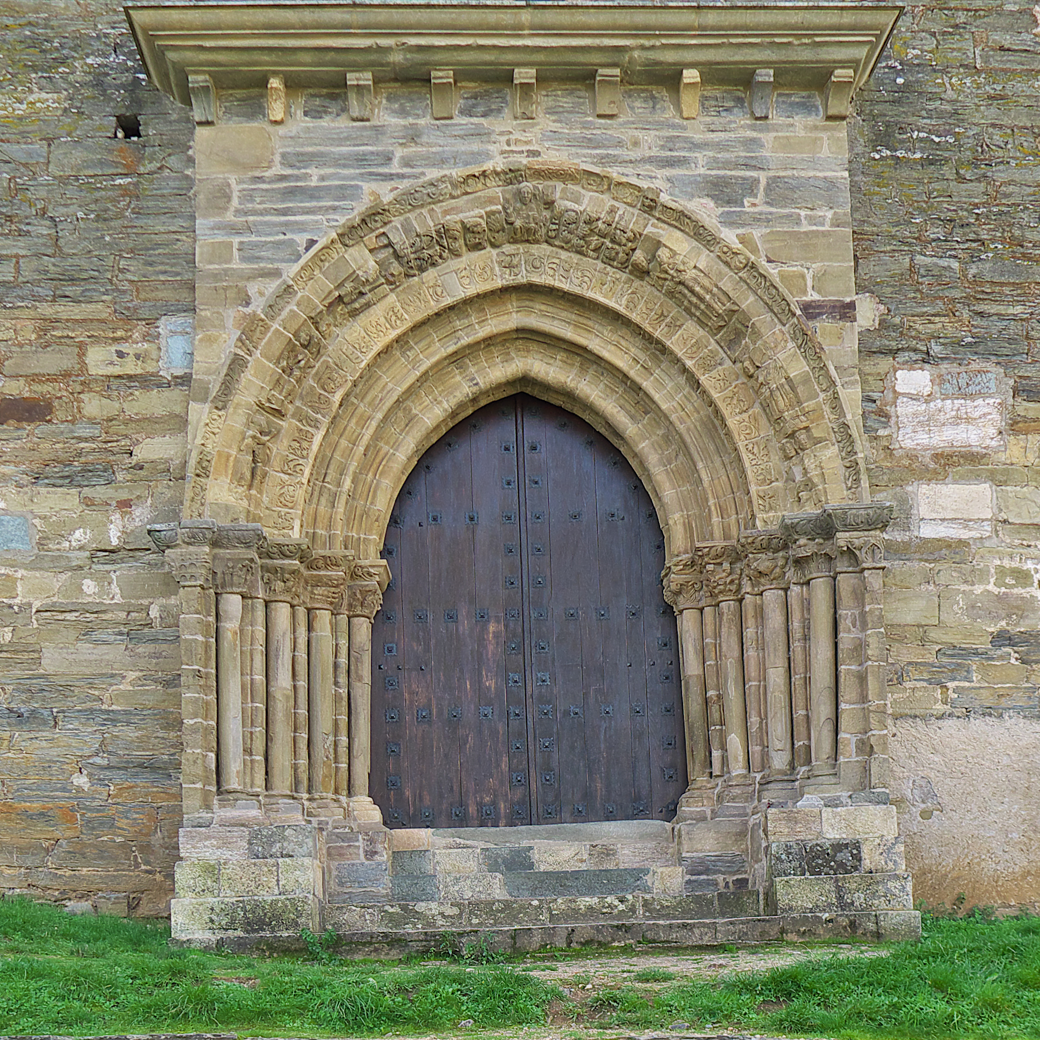 Puerta del Perdón. Portada septentrional de la iglesia Jacobea del Camino de Santiago Francés. Construída en el primer tercio del siglo XIII, presenta una bella ejecución y arco ligeramente apuntado. Queda abierta en los años Jacobeos.